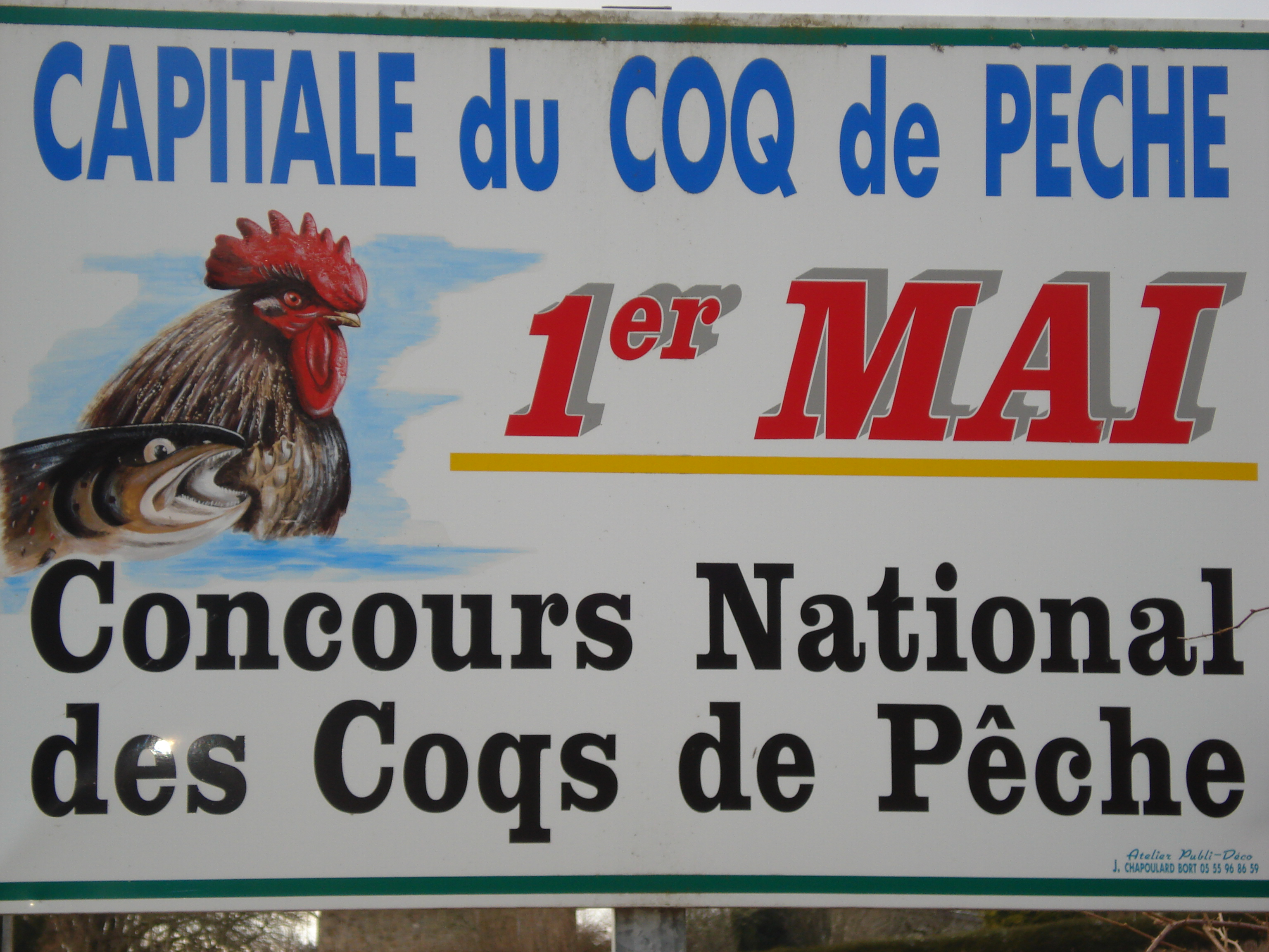 Bienvenue à Neuvic, dans l'entrée du village